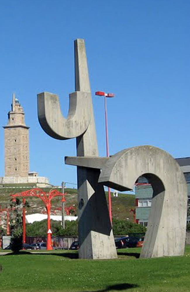 Escultura de hormigón ubicada al lado de la Torre de Hércules de a Coruña. Obra Póstuma realizada en 1992.